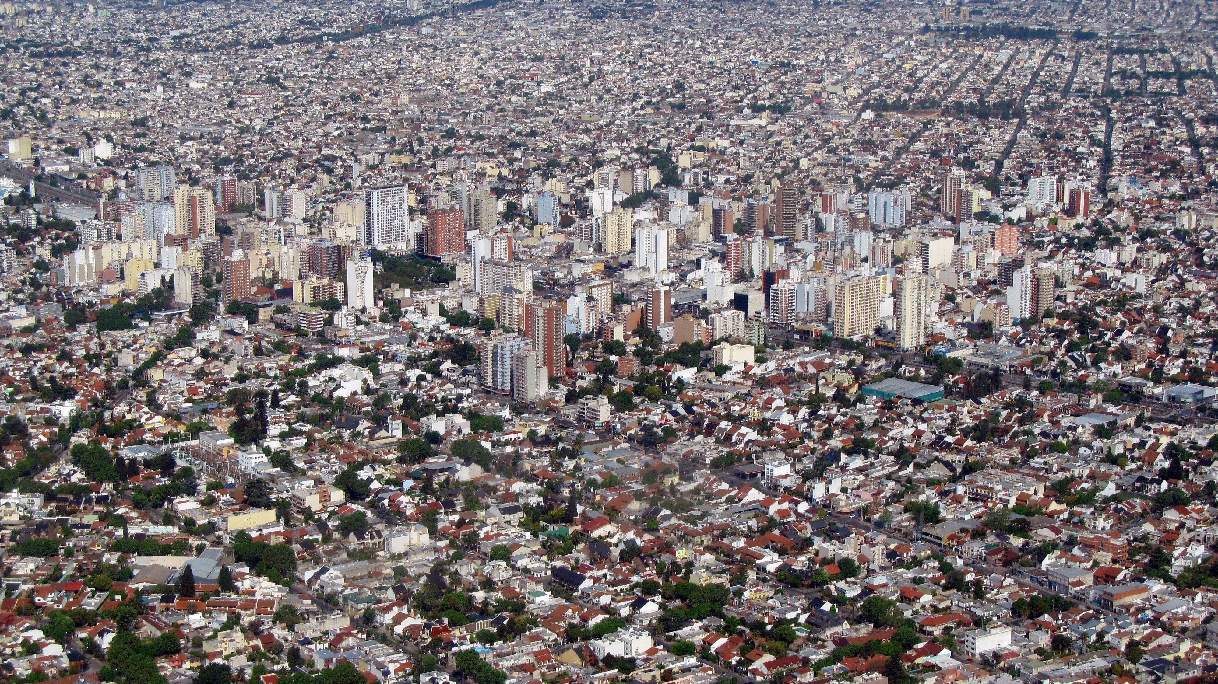 Foto aerea de Ramos mejia